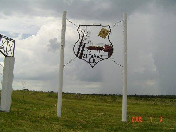 Fotografía del escudo de la localidad